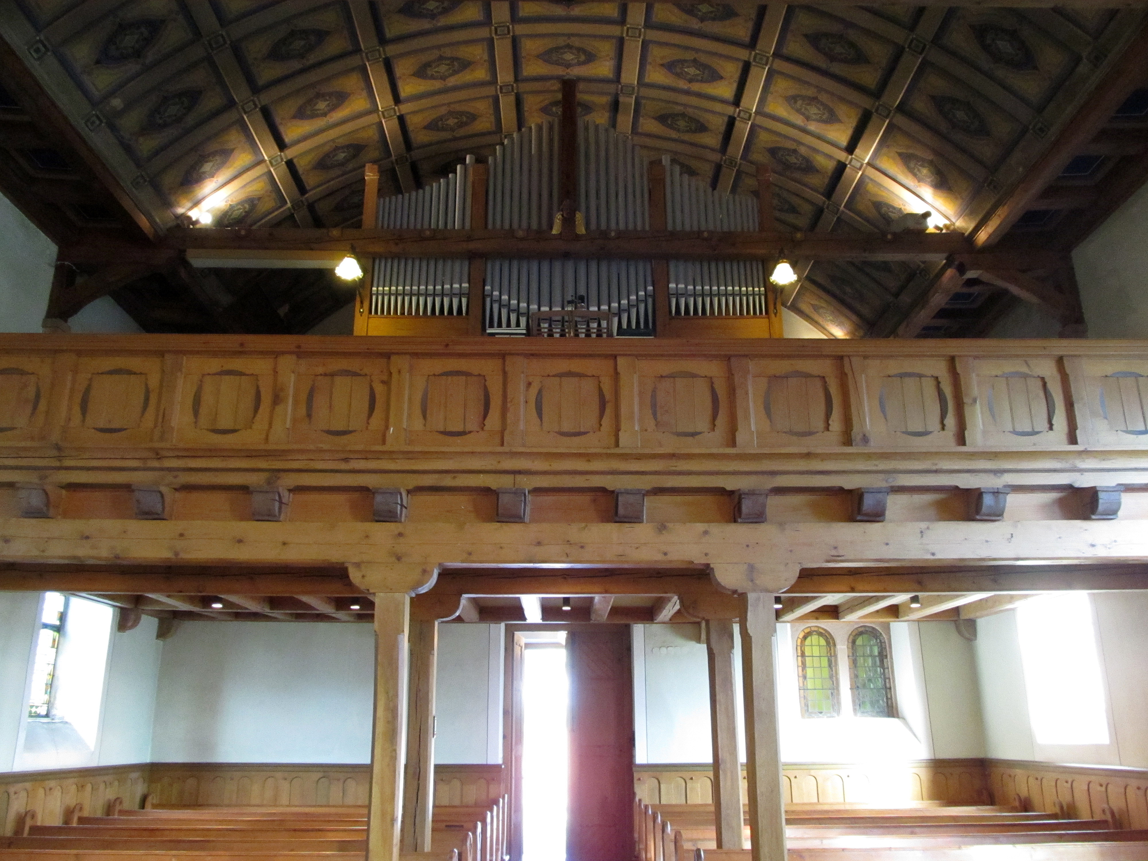 Orgelempore der Protestantischen Kirche Höchen, einem Stadtteil von Bexbach, Saarland